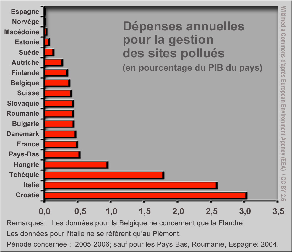 Ce graphique montre les dépenses annuelles pour la gestion des sites contaminés, pour quelques pays (européens) proportionellement à leur PIB (indice dont la valeur est discutée, car n'internalisant pas les coûts environnementaux) (Source: EEE, données européenne des sols Base de données / et des cartes];. CC-by-2.5, récupéré 22/10/2011 Voir aussi [données sur les sols de base] Attention, les données pour la Belgique ne concernent que la Flandre. Les données pour l'Italie ne se réfèrent qu'au Piémont. Période de couverture: 2005-2006; sauf pour les Pays-Bas, Roumanie, Espagne (2004).